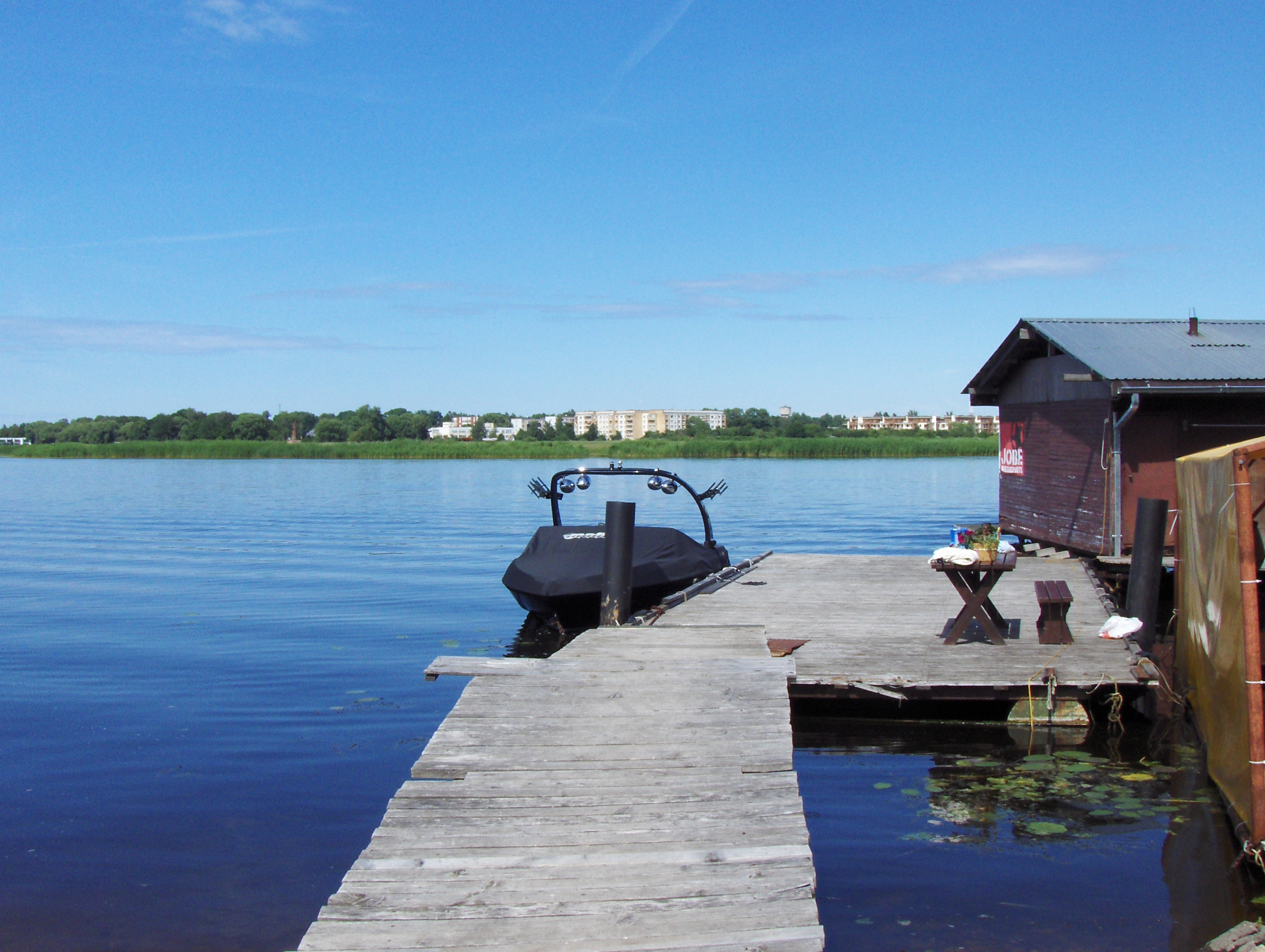 jahtklubs